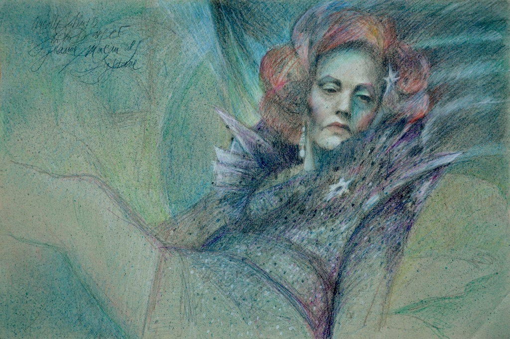 Pastell auf handgeschöpften Büttenpapier 51,5 x 76,5 cm, März 1982 "Die französische Schauspielerin Jeanne Moreau als Madame Lysiane in dem letzten Rainer Werner Fassbinder Film "QUERELLE" nach dem gleichnamigen Roman von Jean Genet. Das Bildnis ist während einer Drehpause im CCC-Filmstudio Berlin in der Dekoration des Oscar-Preisträgers Rolf Zehetbauer ("Cabaret") entstanden. Das Kostüm stammt von Babara Baum."